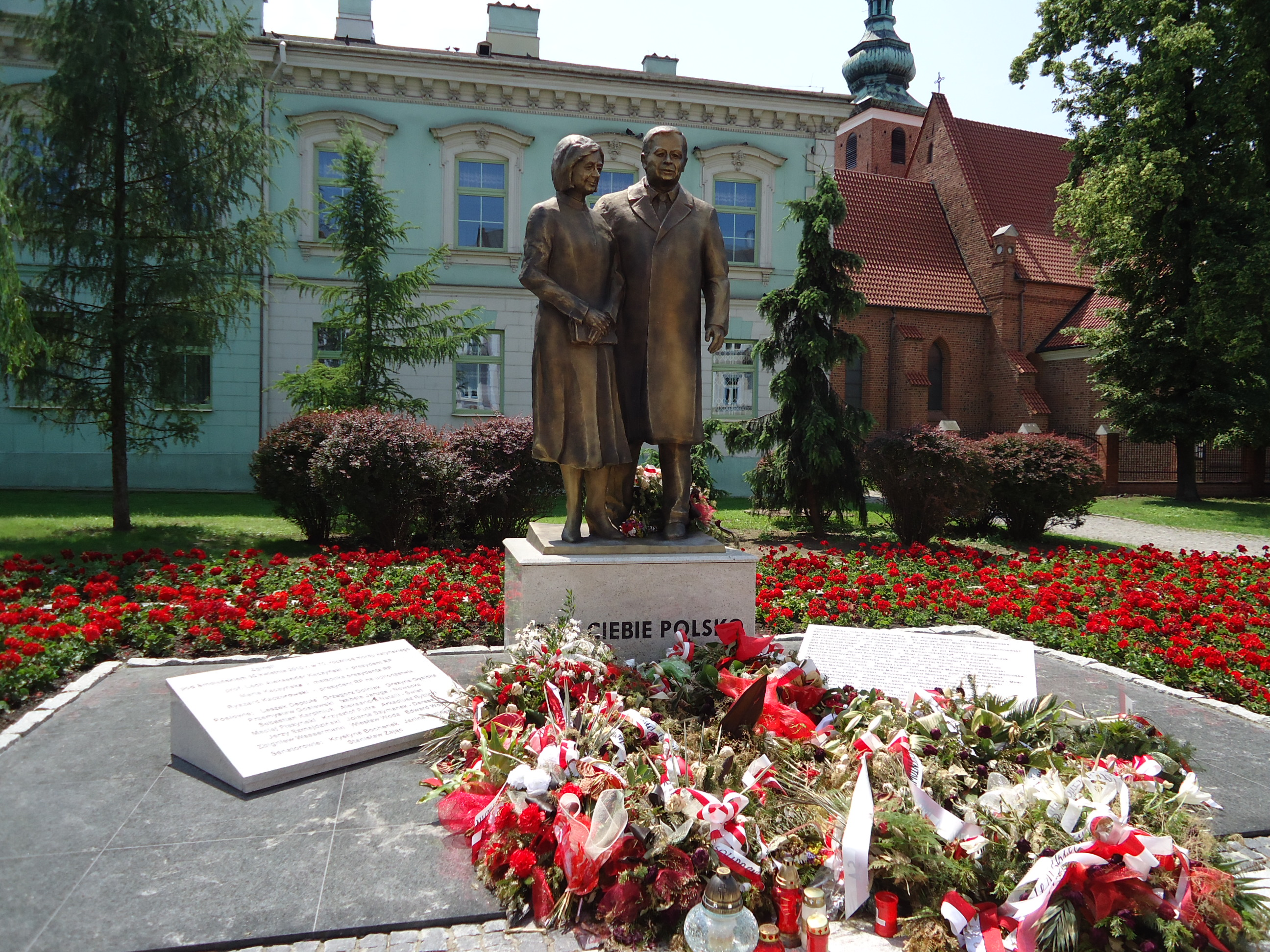 Rzeźba autorstwa Andrzeja Renesa